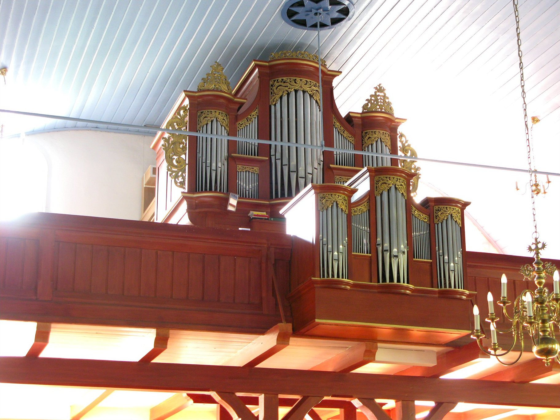 Orgel in Warsingsfehn, Landkreis Leer